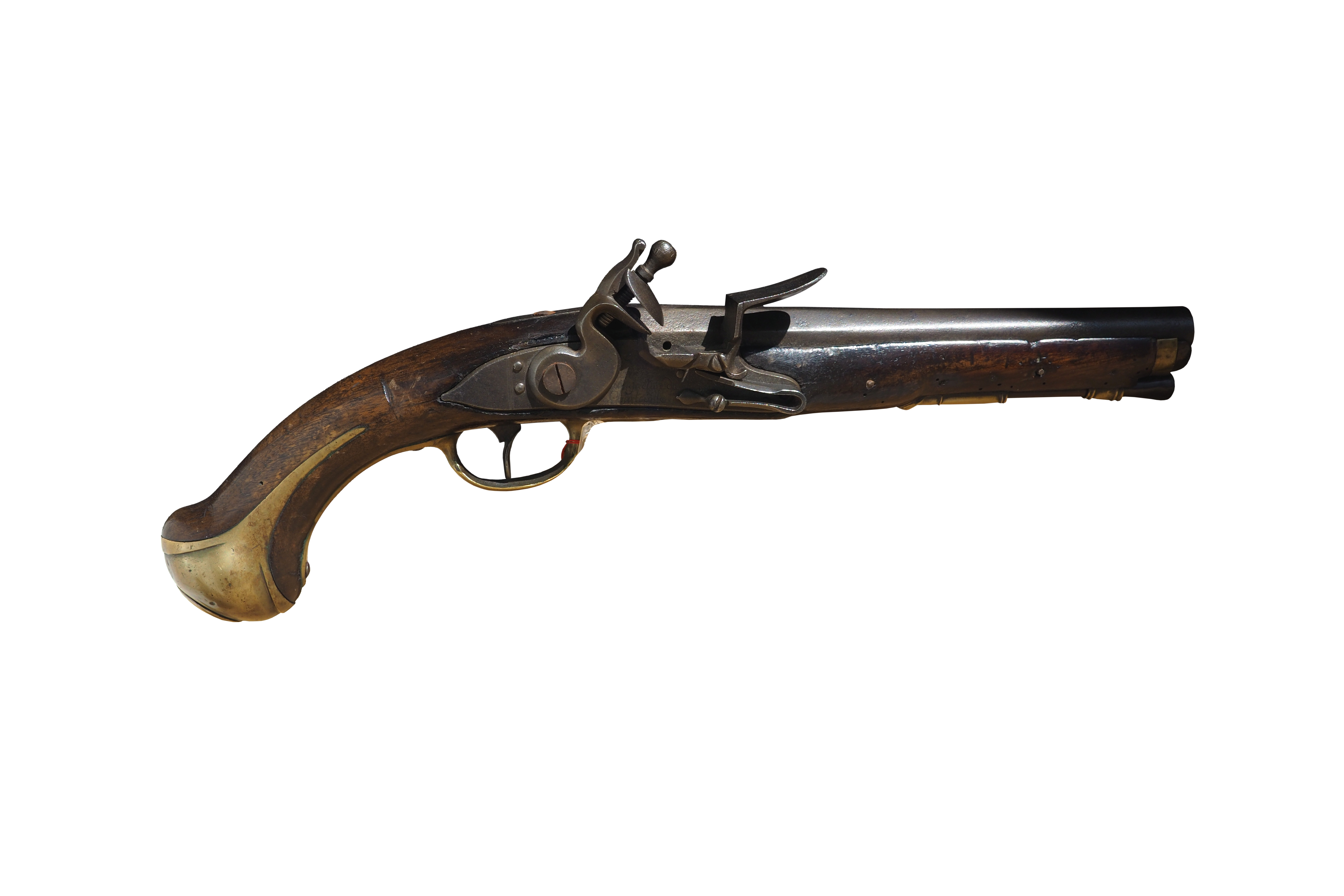 Pistolet modèle 1733.